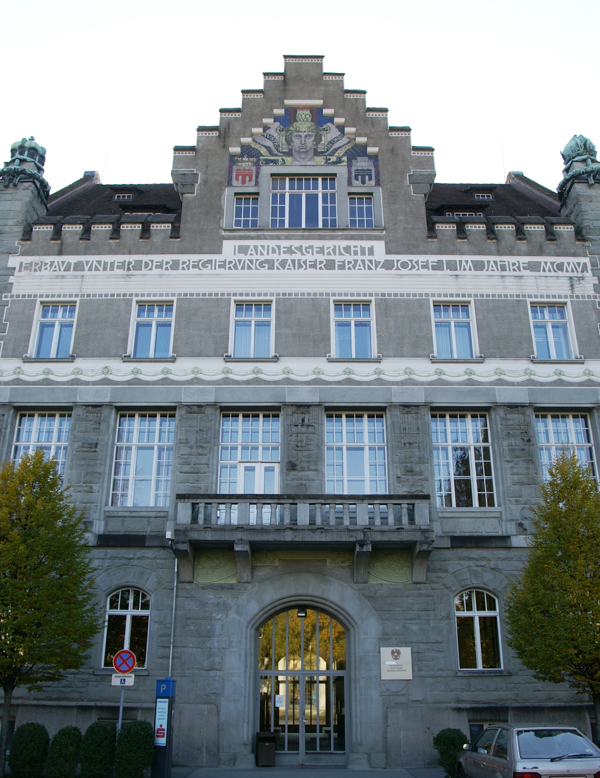 Eingang Landesgericht für Vorarlberg, Schillerstrasse 1 in Feldkirch. Architekt: Ernst Dittrich Baujahr 1903/05 Jugendstil - Strassensicht Graf-Hugo-Wuhrgang